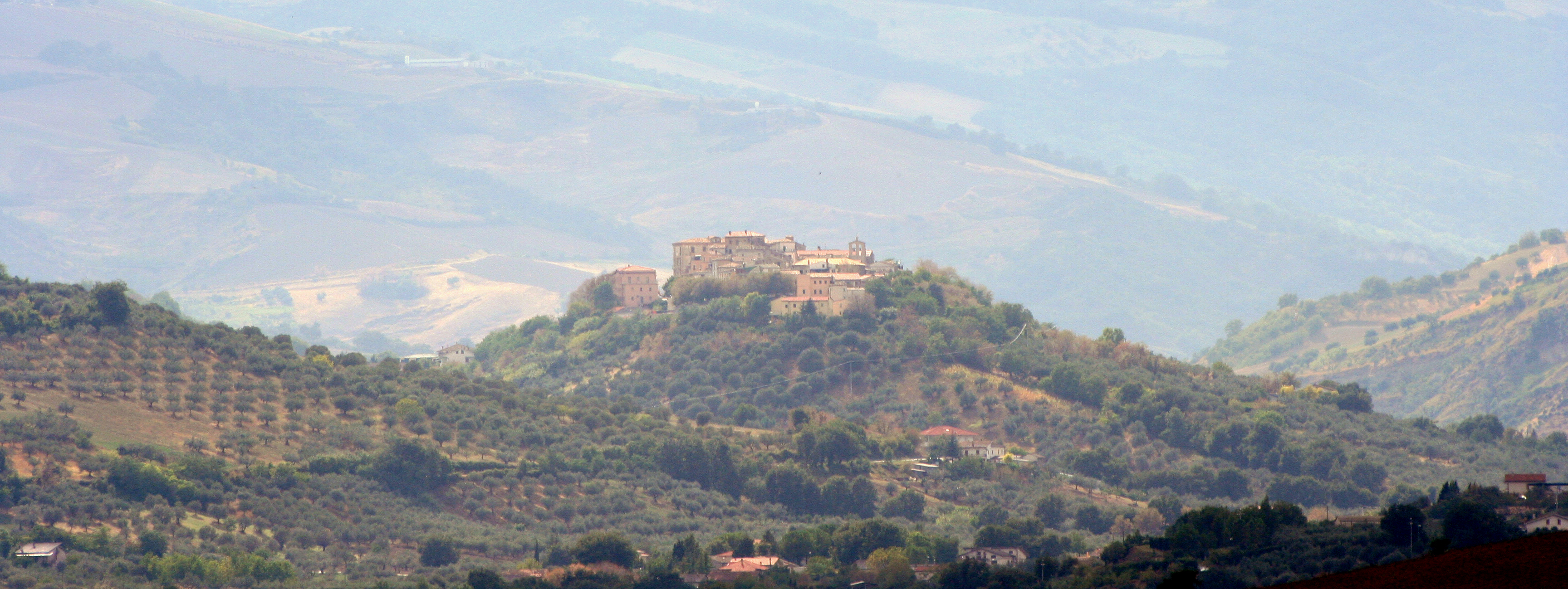 Cugnoli Veduta del centro storico, Italy